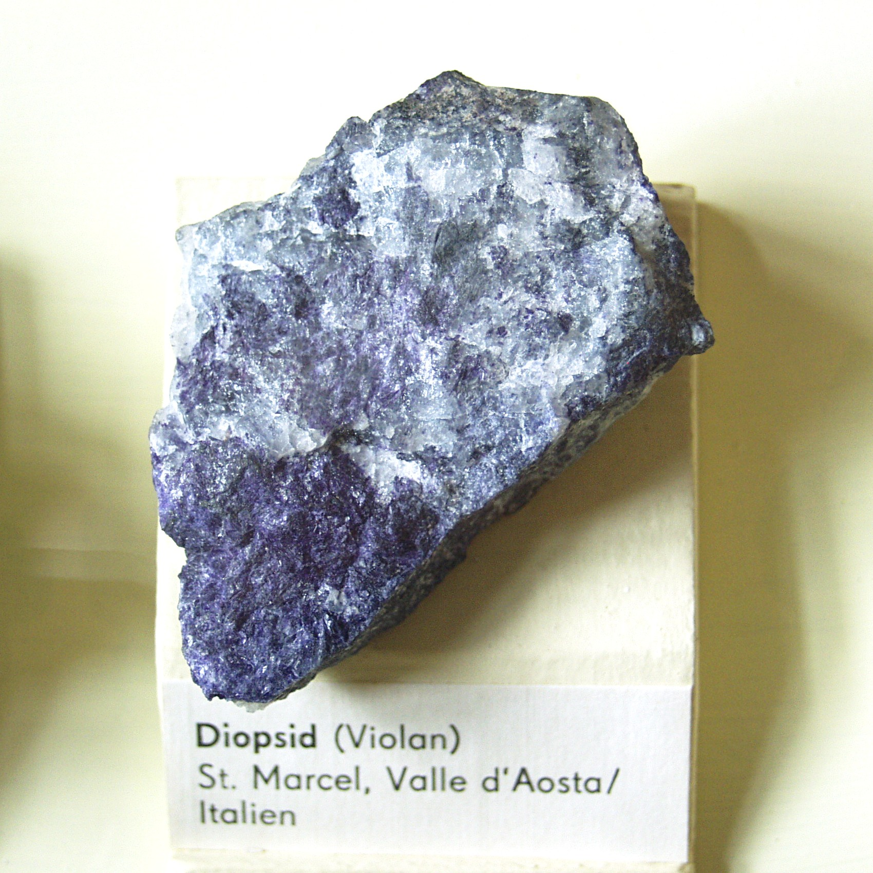 Diopsid (Violan), St. Marcel, Valle d'Aosta, Italien. Museum für Naturkunde (Berlin).